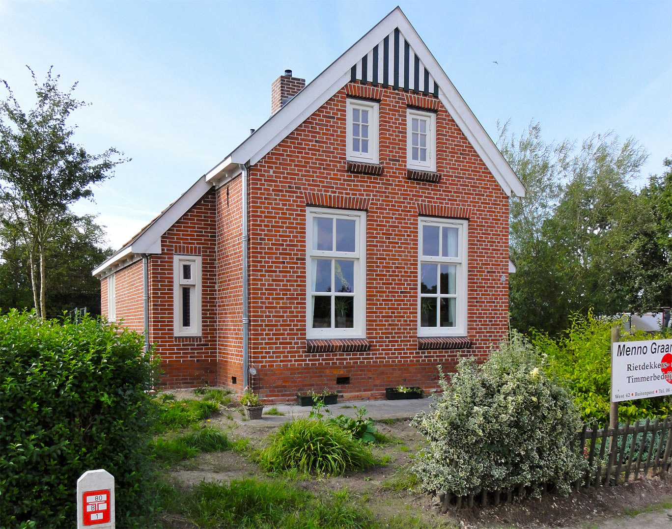 Arbeiderswoning aan de Mûntsegroppe 14 Harkema